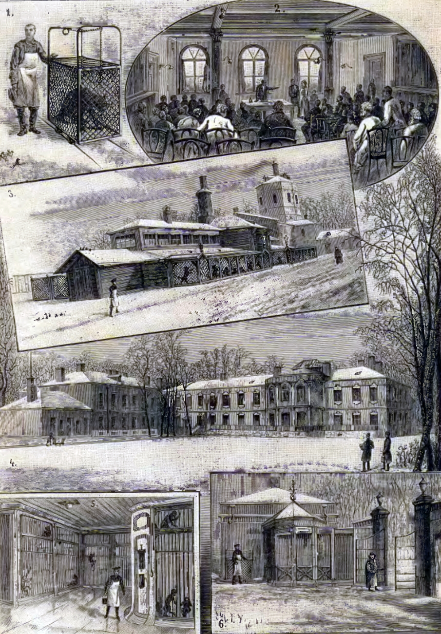 Императорский Институт экспериментальной медицины принца Александра Петровича Ольденбурского. 1. Тележка для бешеных собак, 2. Аудитория, 3. Собачник (внешний вид), 4. Главное здание (клиническая лаборатория), 5. Помещение обезьян (внутренний вид), 6. Приёмная клетка для бешеных собак